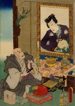 Toyokuni III, 1854, Andachtsbild für Ichikawa Danjuro VIII